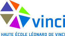 Logo Haute Ecole Léonard de Vinci